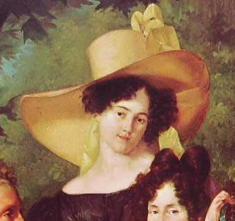 Particolare del dipinto Ritratto della famiglia Fossati, 1830, di Michelangelo Grigoletti